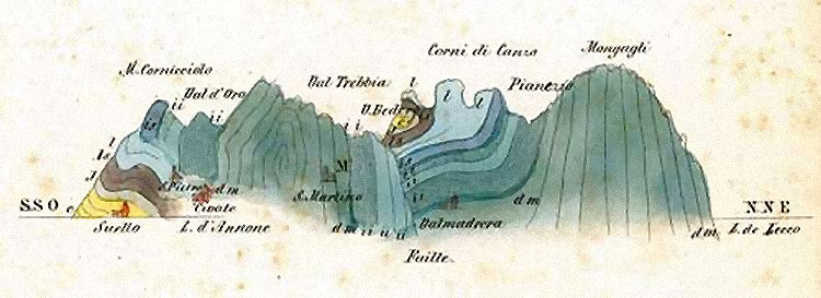 Tavola a colori sulla geologia dei Corni di Canzo, Moregallo e Cornizzolo, contenuta in Paleontologie lombarde.